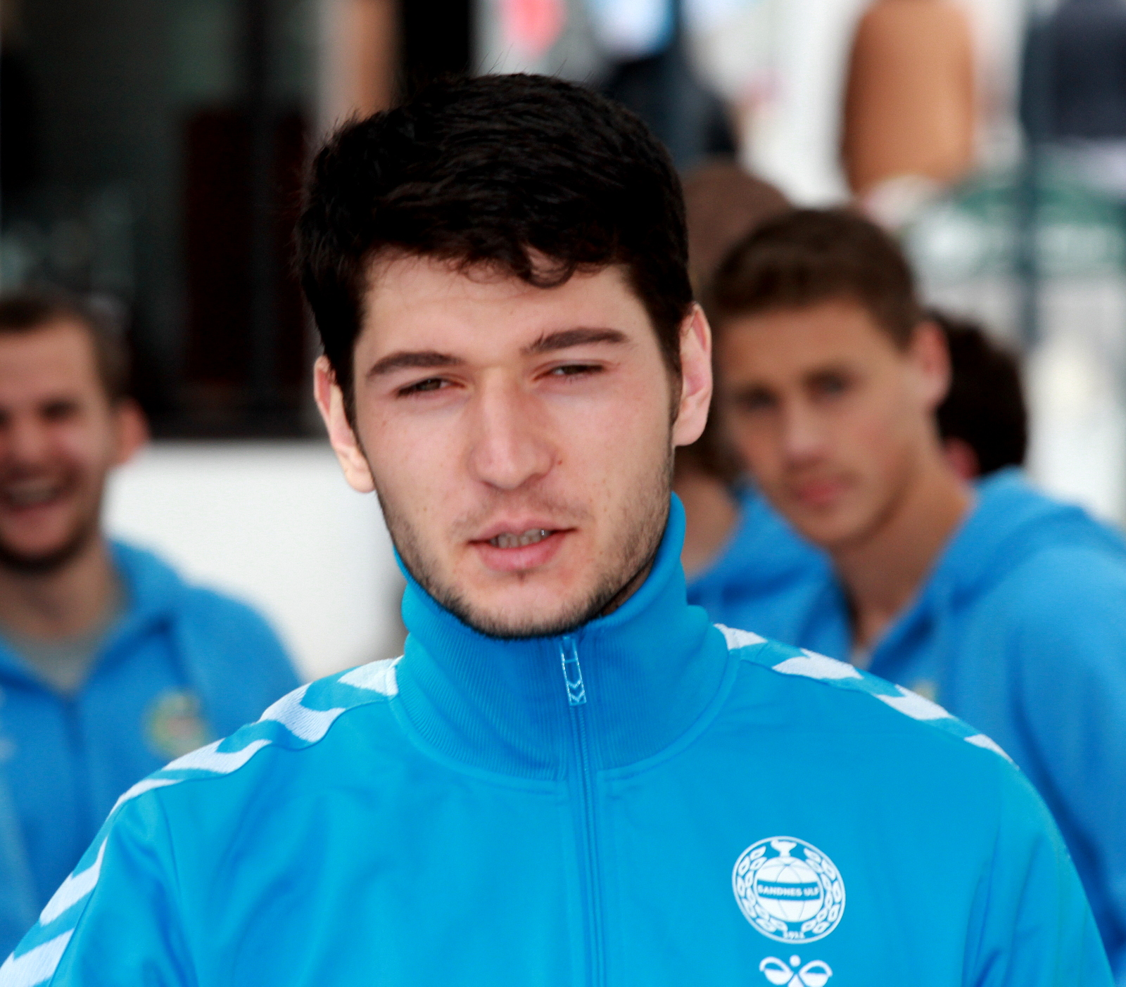 Anel Raskaj foran 2014 sesongen for Sandnes Ulf